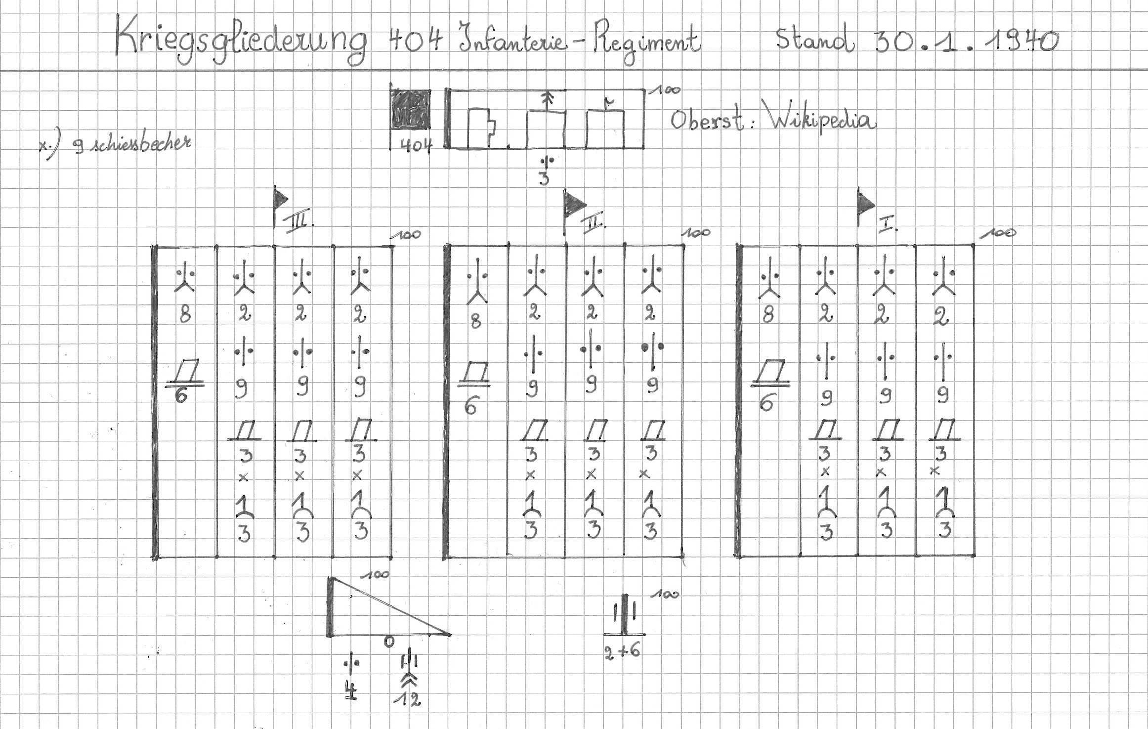 KriegsGliederung inf rgt 30 jan 1940